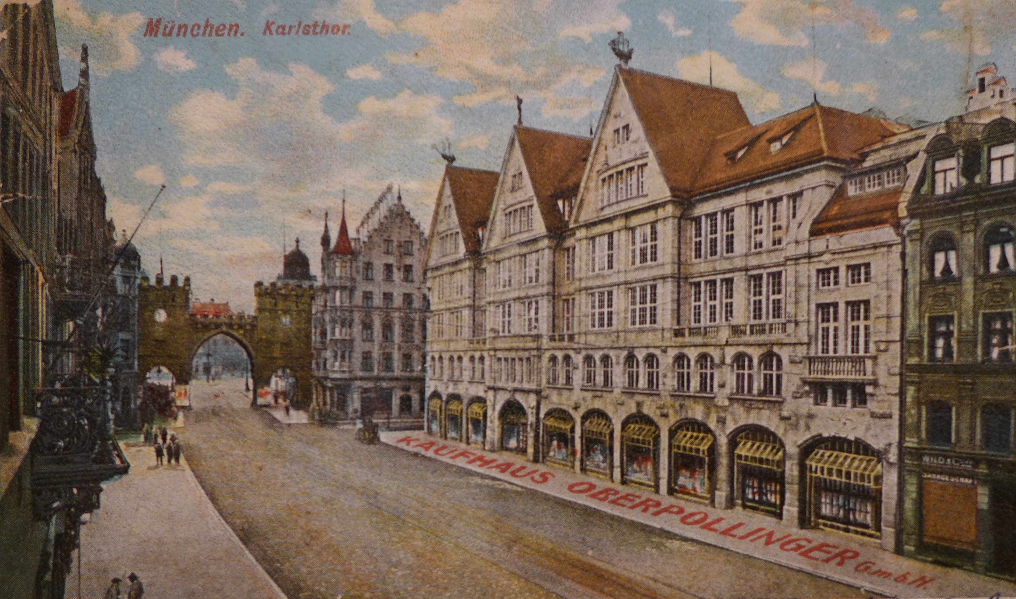 Kaufhaus Oberpollinger, historische Postkarte um 1905, Privatsammlung